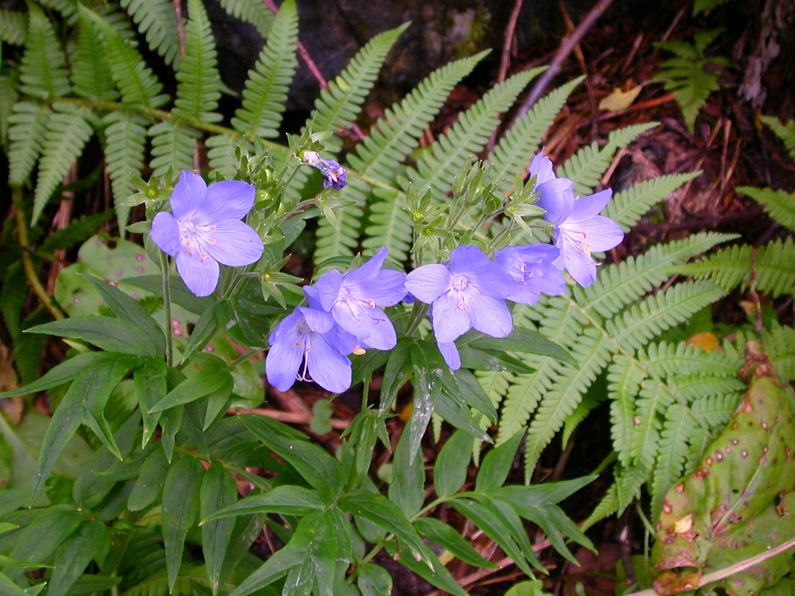 P. acutiflorum var. nipponicum ミヤマハナシノブ